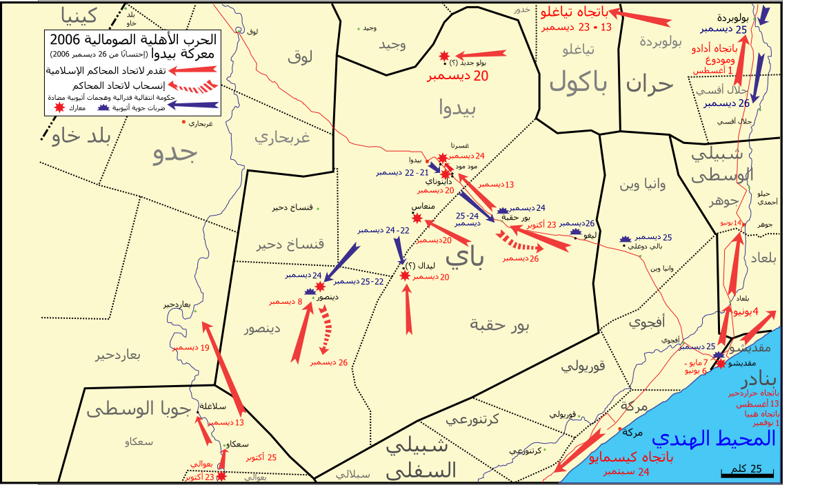 معركة بيدوا،26 ديسمبر سنة 2006